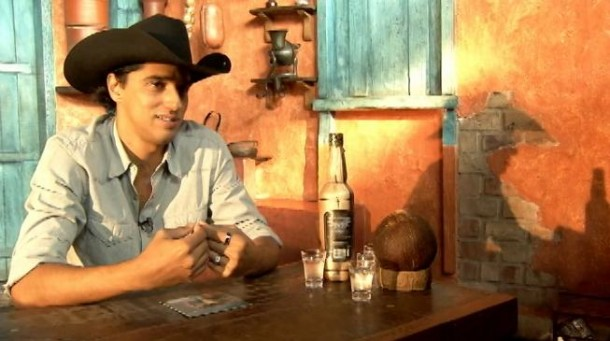 Alberto Pimentel, conhecido como Alberto Cowboy, brasileiro, cantor sertanejo e ex-participante do reality show Big Brother Brasil.